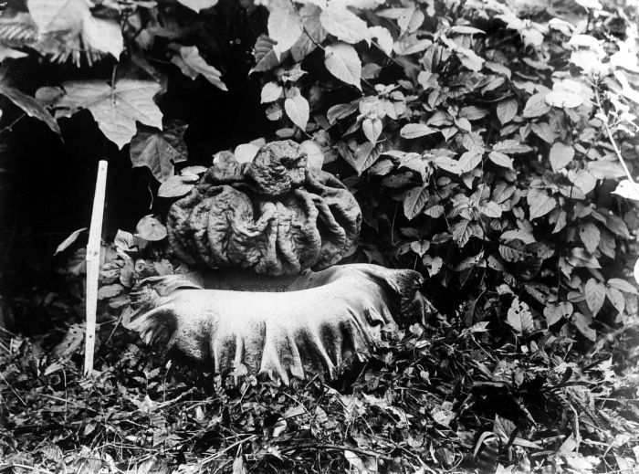 Repronegatief. Een oud exemplaar van de Amorphophallus campanulatus = Amorphophallus paeoniifolius, Heilig Bosch, Kediri